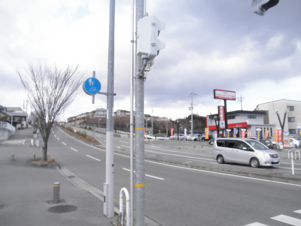 兵庫県神戸市北区八多町中